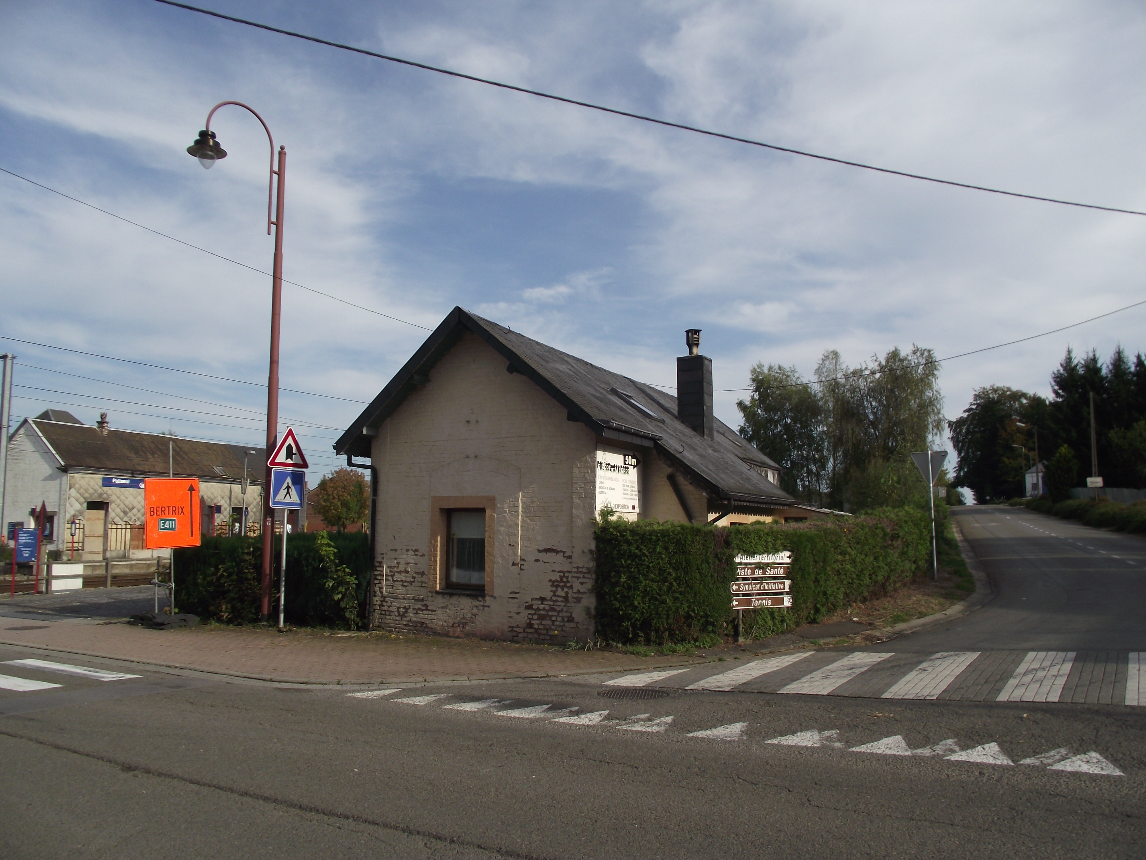 Klein buurtspoorwegstationsgebouw nu in gebruik als woning